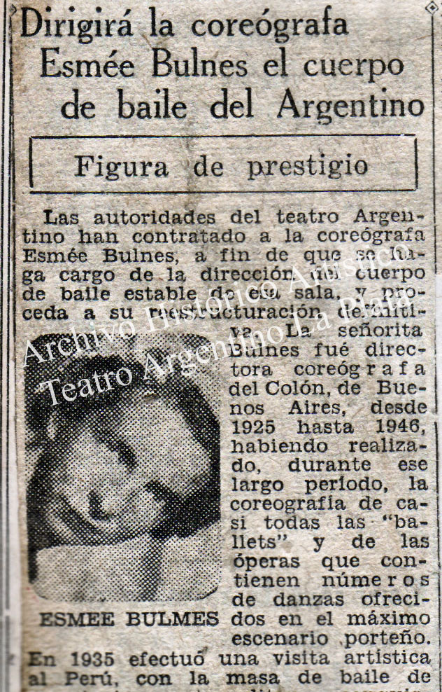 Recorte periodístico, Diario El Día (publicado el 31/07/1947), de la colección patrimonial del Archivo Histórico Artístico del Teatro Argentino de La Plata